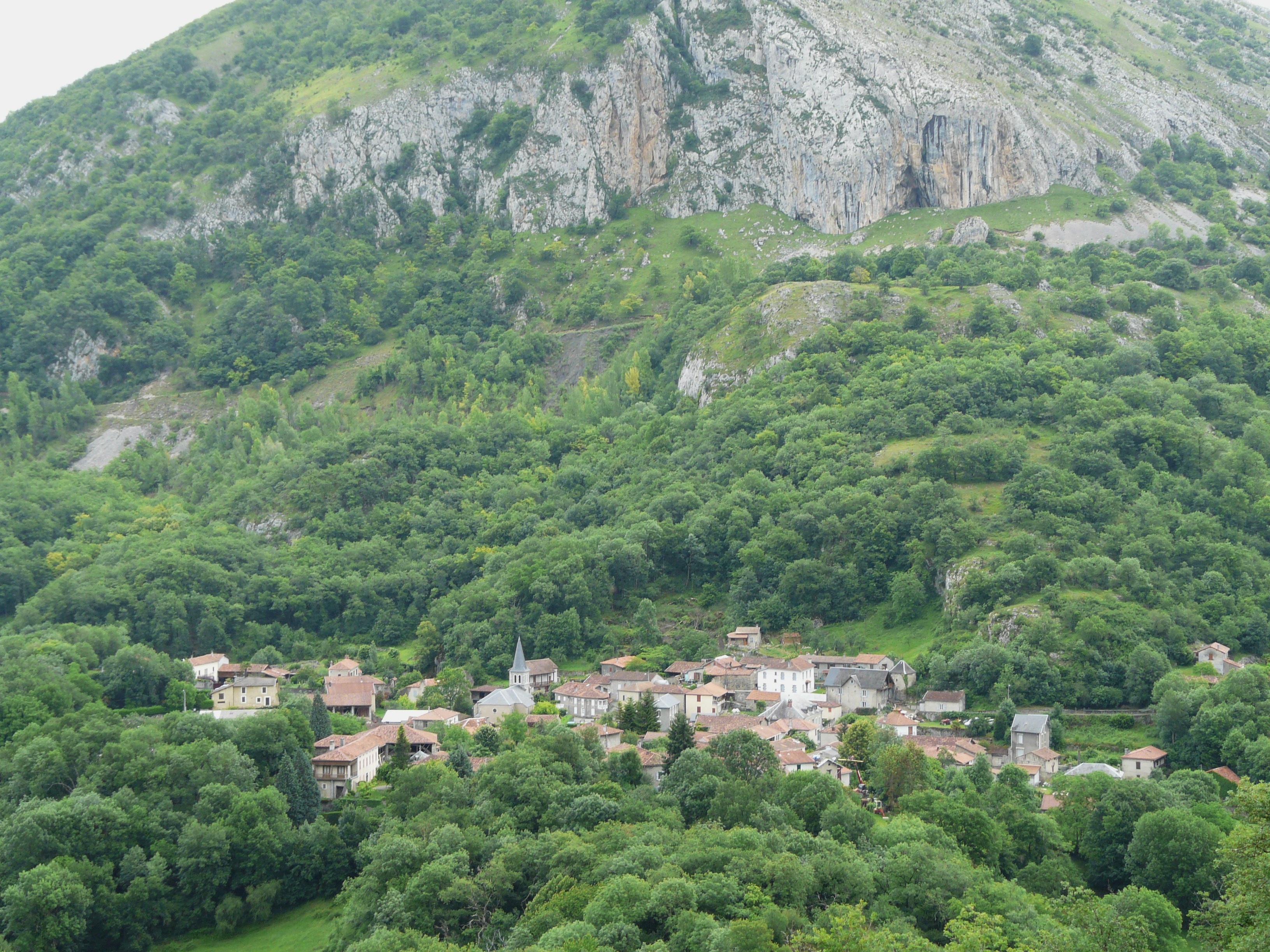 Le village deTroubat vu depuis le château des Comtes de Comminges à Bramevaque, Hautes-Pyrénées, France.